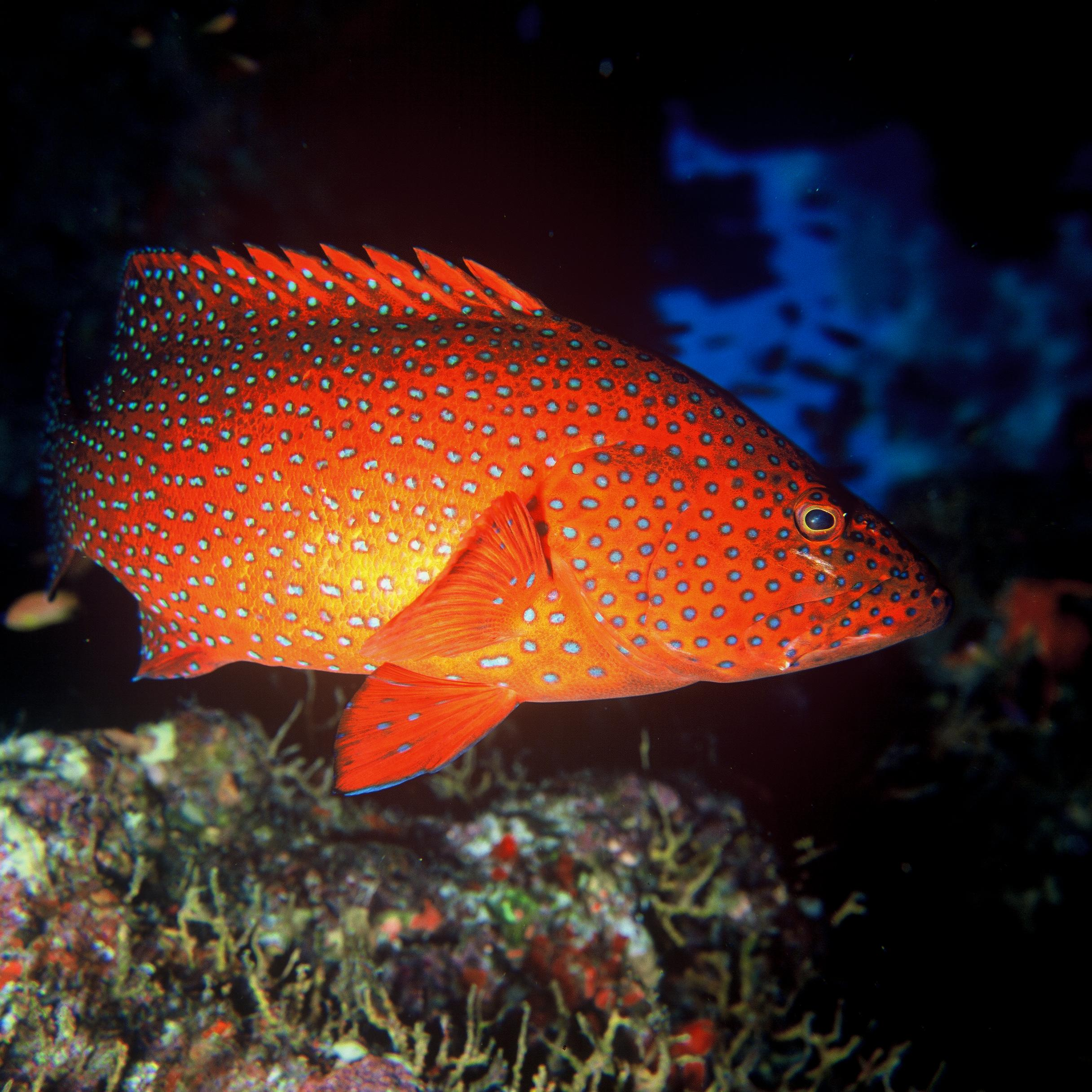 Description Rode koraalbaars (Cephalopholis miniata) Date1988SourceRode zee (Egypte)AuthorAlbert KokPermission (Reusing this file) publiek domein Rode koraalbaars (Cephalopholis miniata)